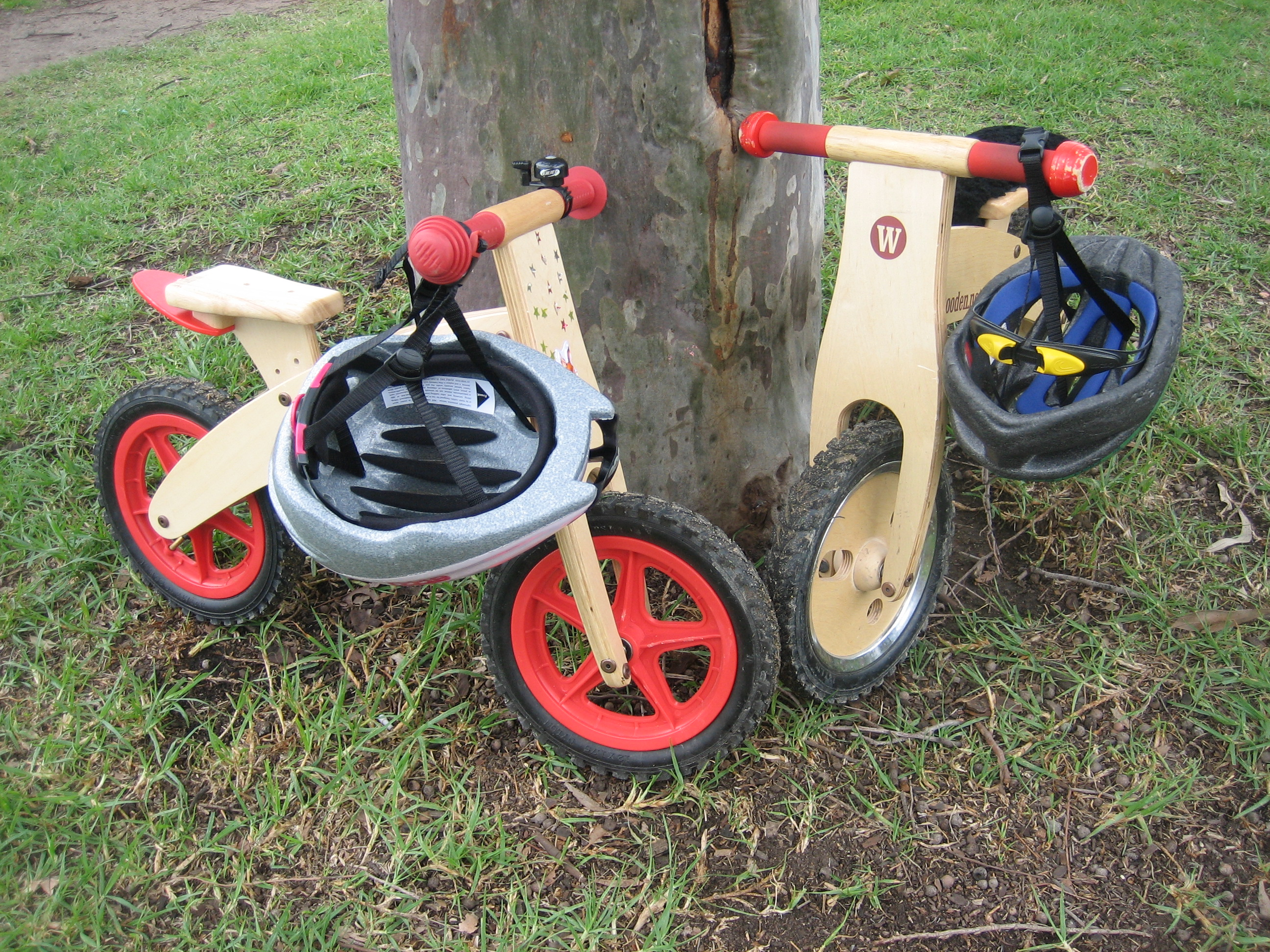 Bike buddies